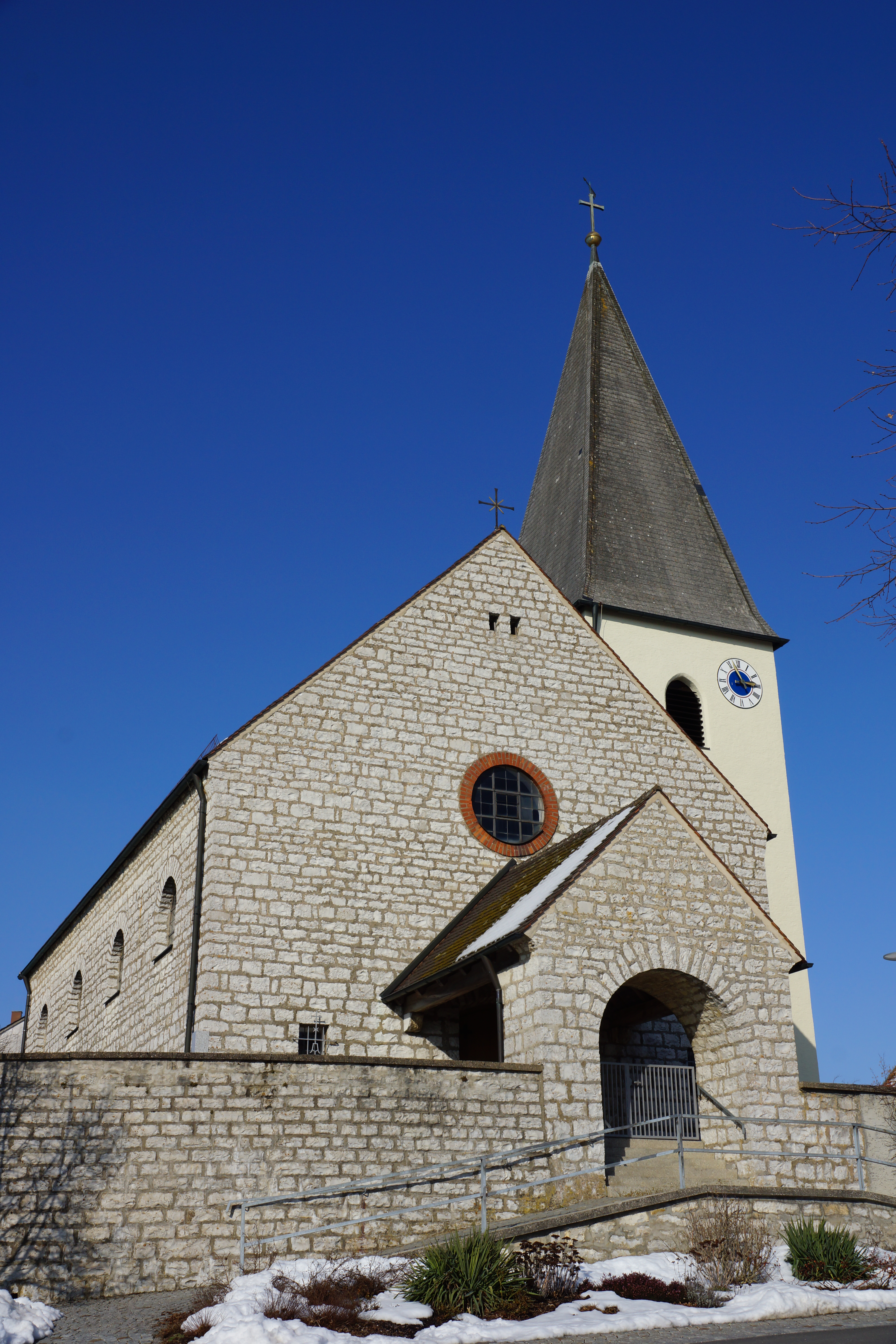 Die katholische Filialkirche St. Pankratius in Siegenhofen